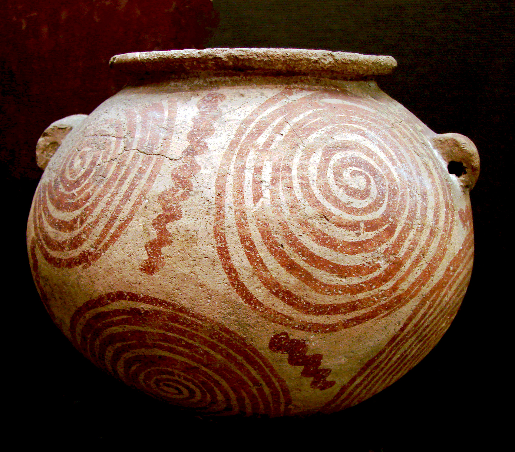 Vase à décor d'ondulations et de spirales, Egypte prédynastique, période de Nagada II. Musée de Laon.